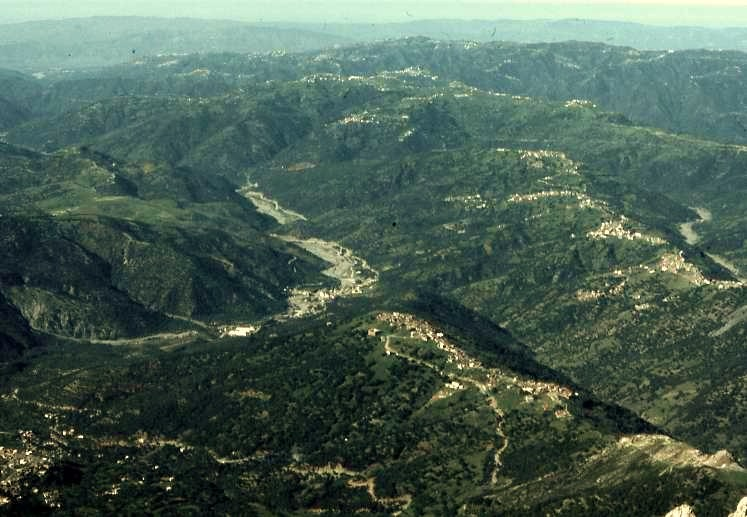 Paysage du Djurdjura (vue depuis le col de Tizi Kouilal), Algérie